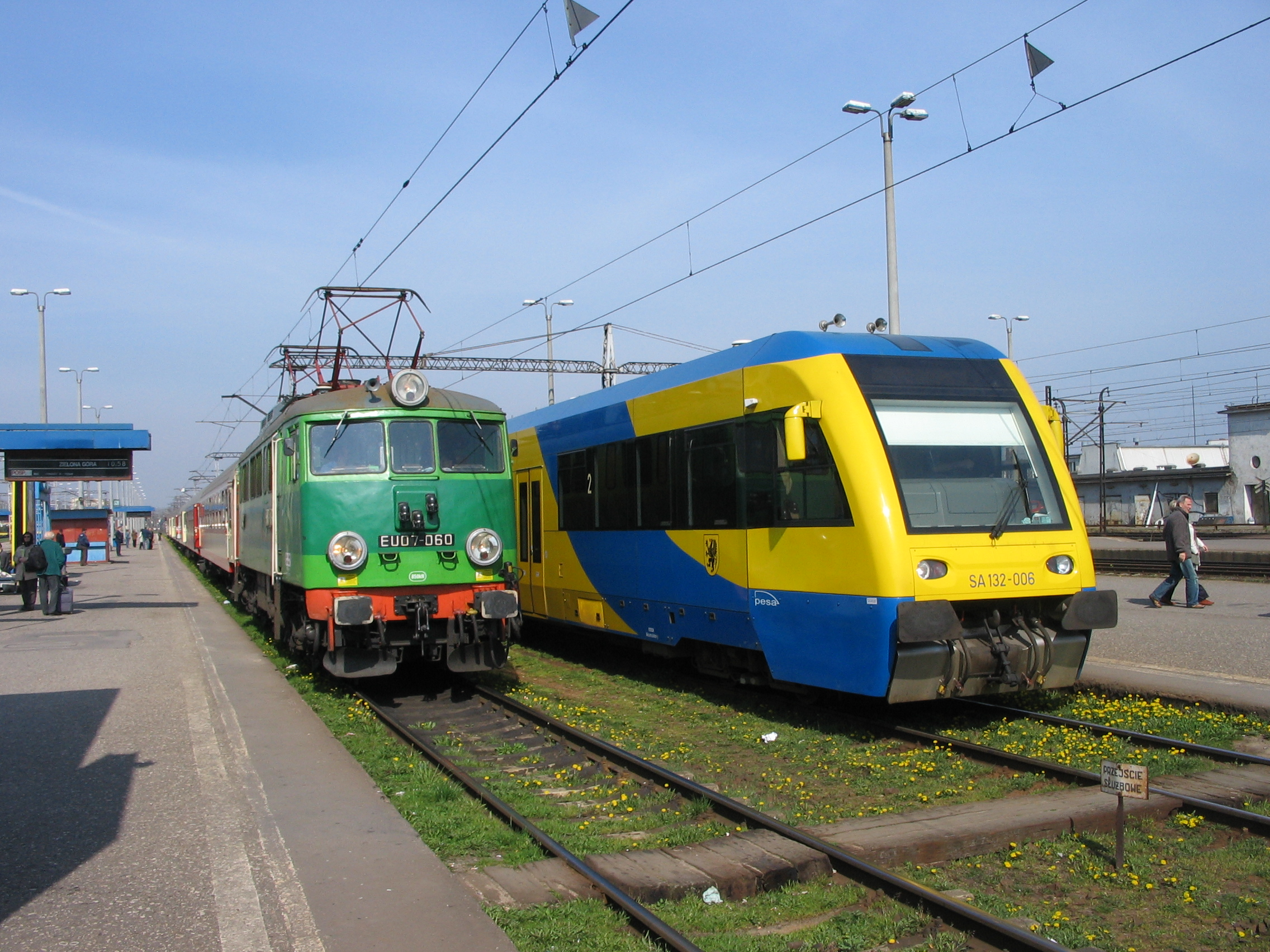 EU07-060 (ciekawostka: górny reflektor posiada również światło czerwone) z pociągiem pośp. do Zielonej Góry (odj. 10.58) i SA132-006 na stacji Gdynia Główna Osobowa